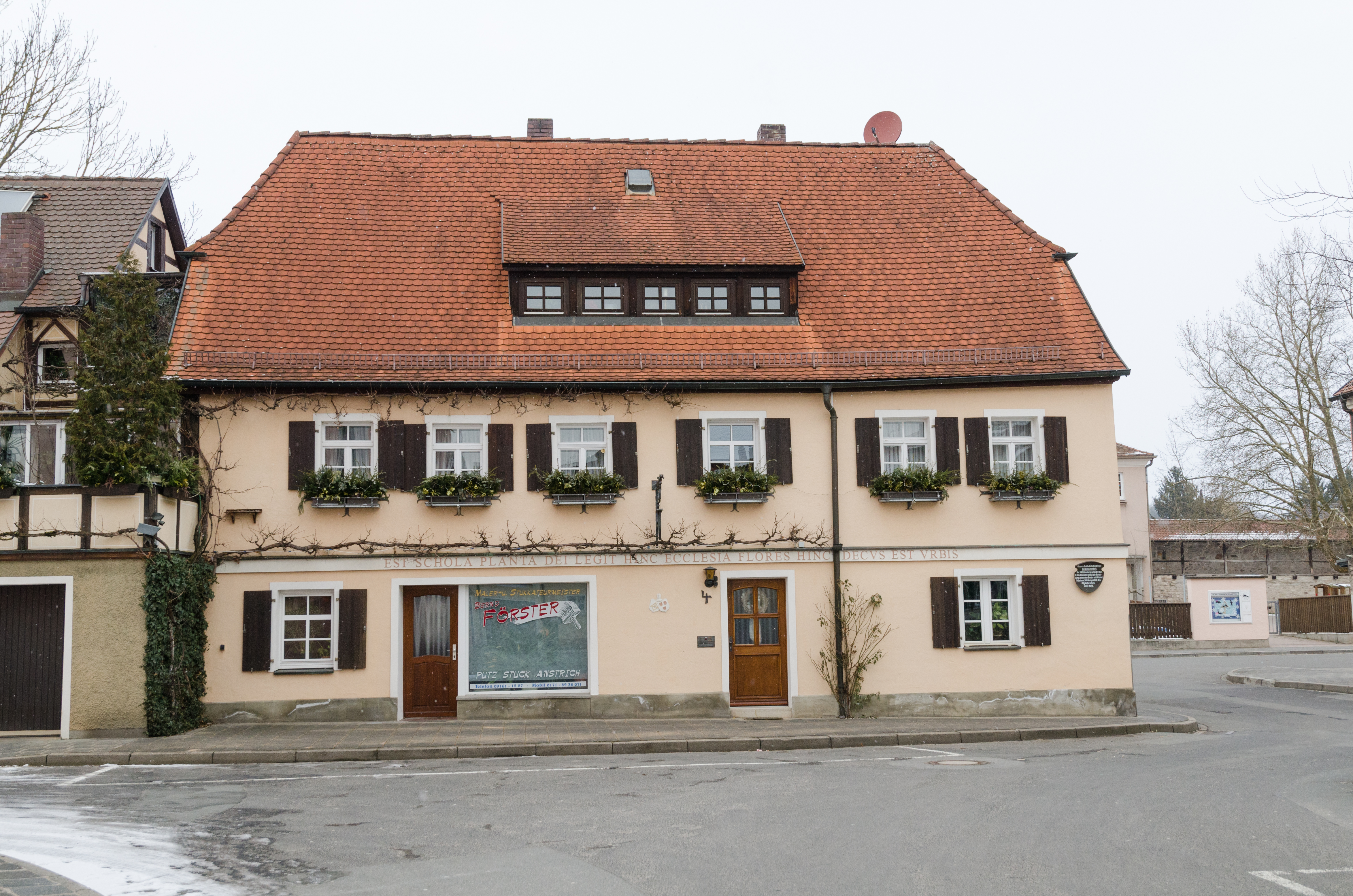 Neustadt an der Aisch, Kirchplatz 4, Ostseite